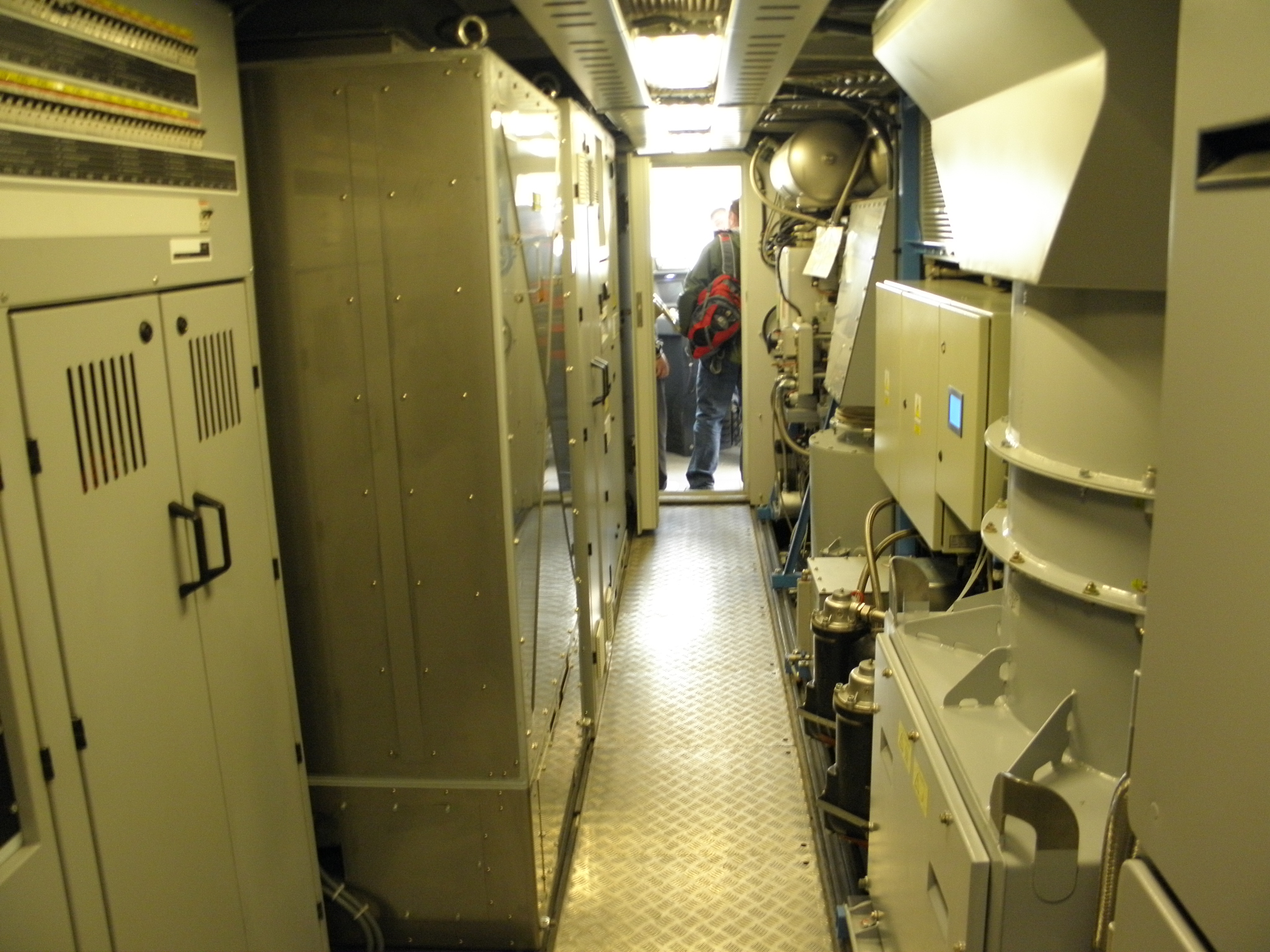 Photo from Trako 2013, Gdańsk/Danzig